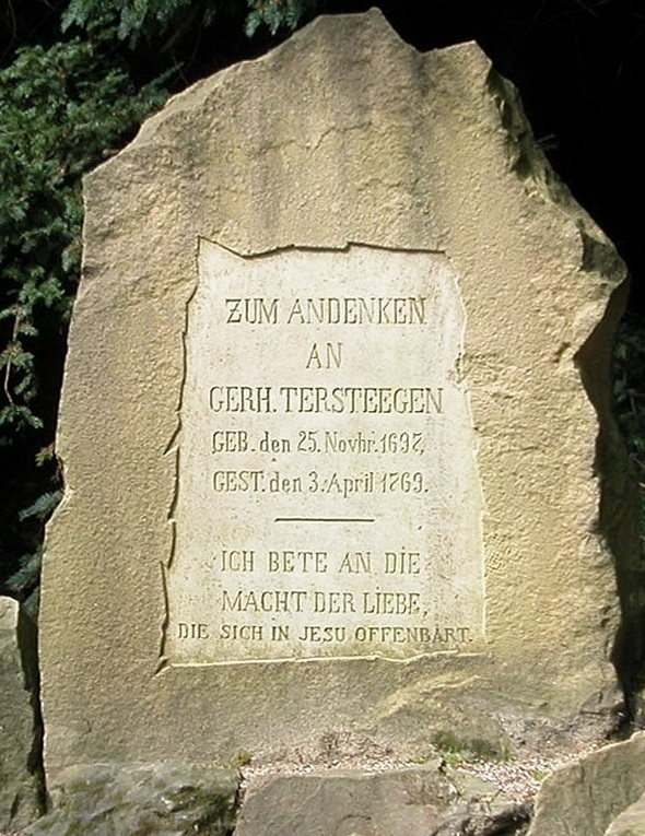 Tersteegen-Denkmal in Mülheim an der Ruhr